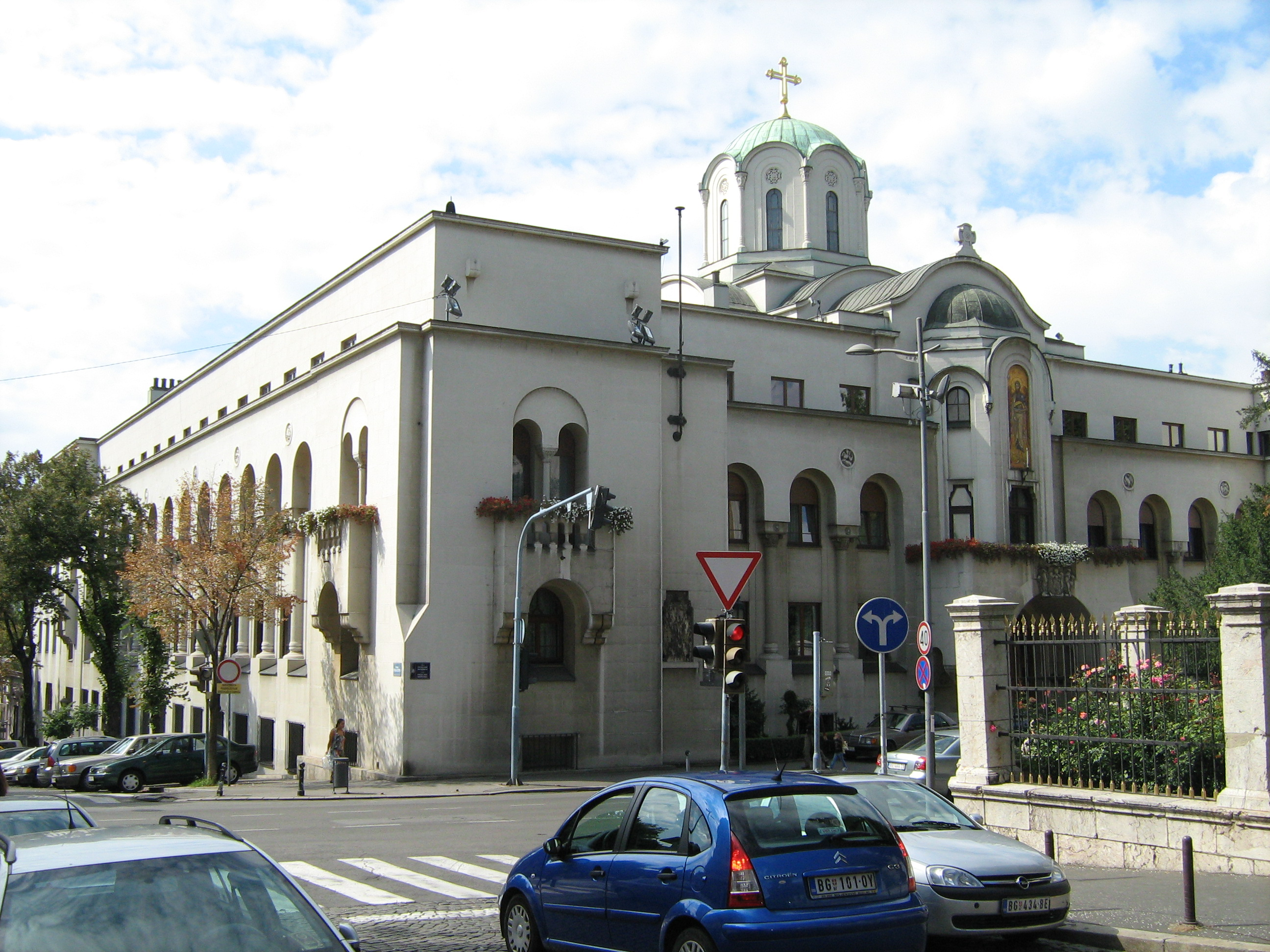 Патријаршија у Београду